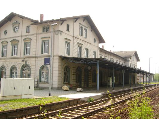 Bahnhof Oberoderwitz selbst erstellt und auf veröffentlicht